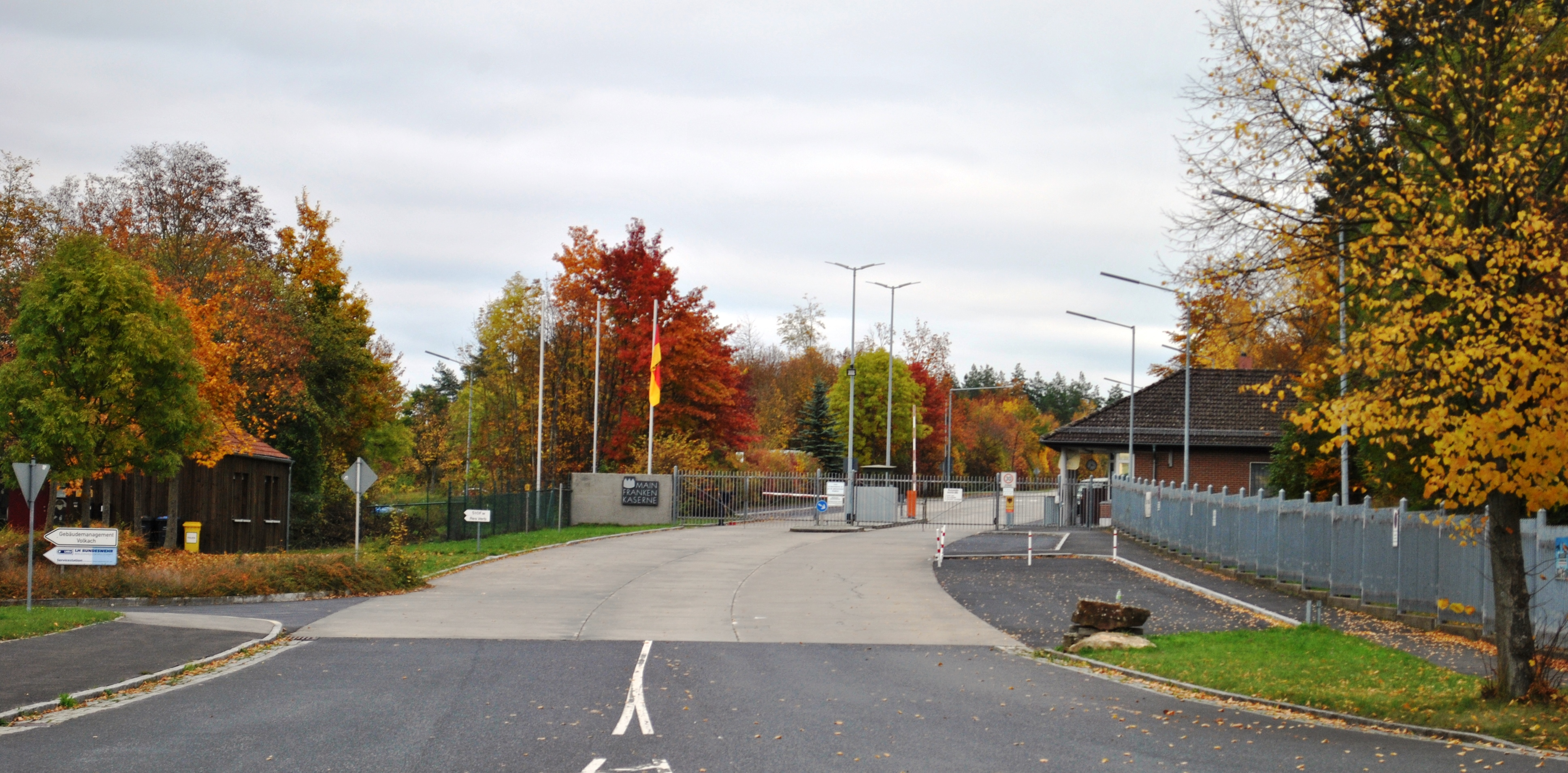 Mainfranken-Kaserne, Dimbacher Straße, Volkach